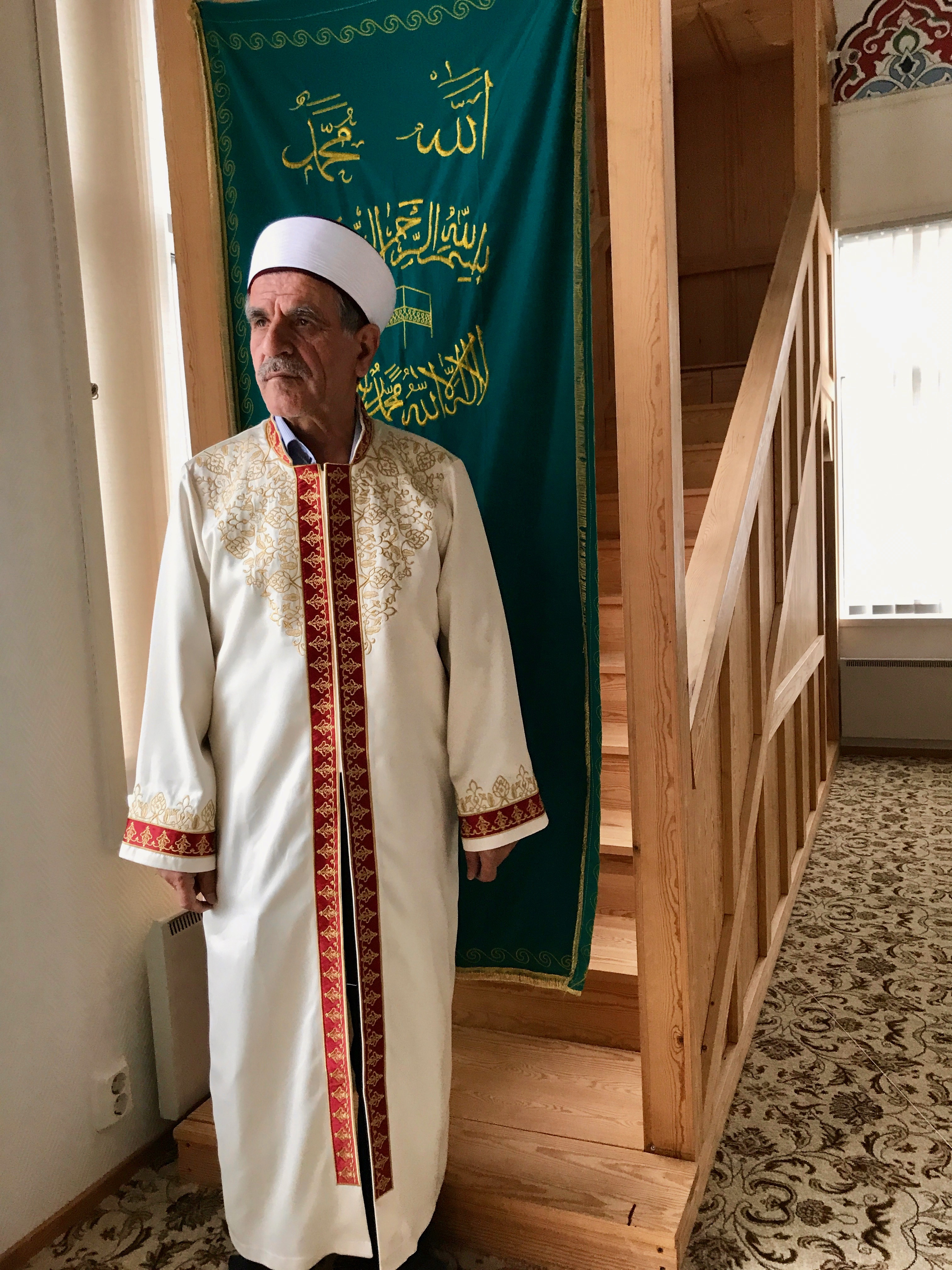 Lahden turkkilaisen moskeijan minbar.